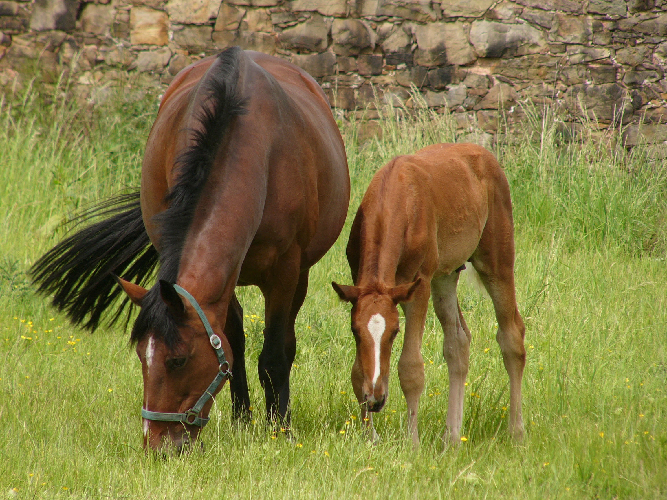 Trakehner. Such beautiful horses here!